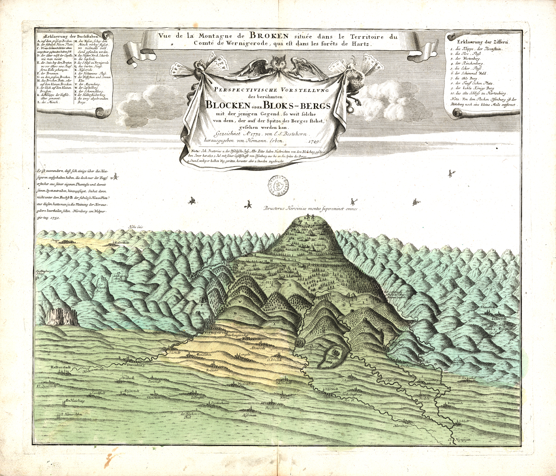 Darstellung des Brockens von L. S. Bestehorn aus dem Jahr 1732